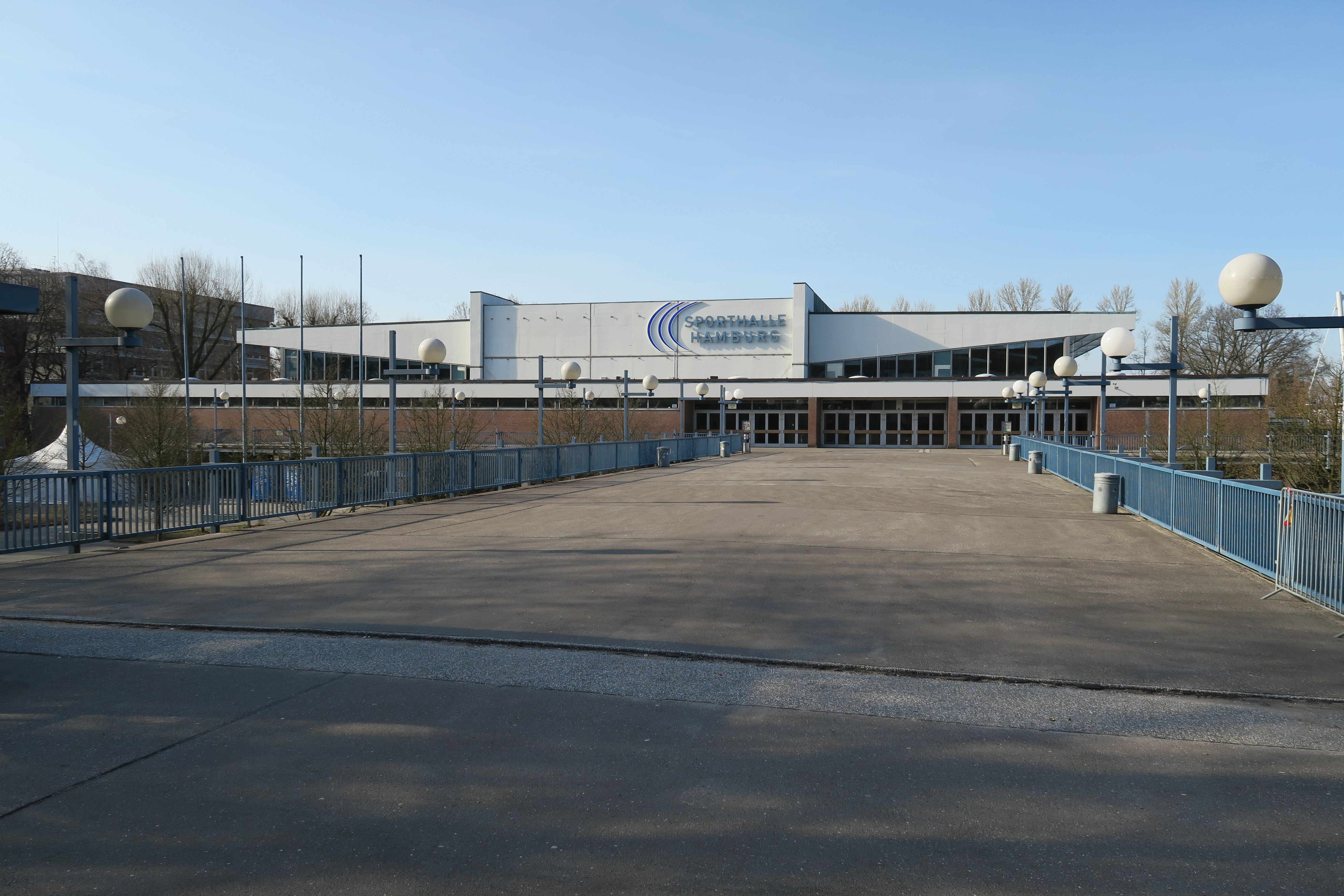 Sporthalle Hamburg (Alsterdorfer Sporthalle) in Hamburg-Winterhude